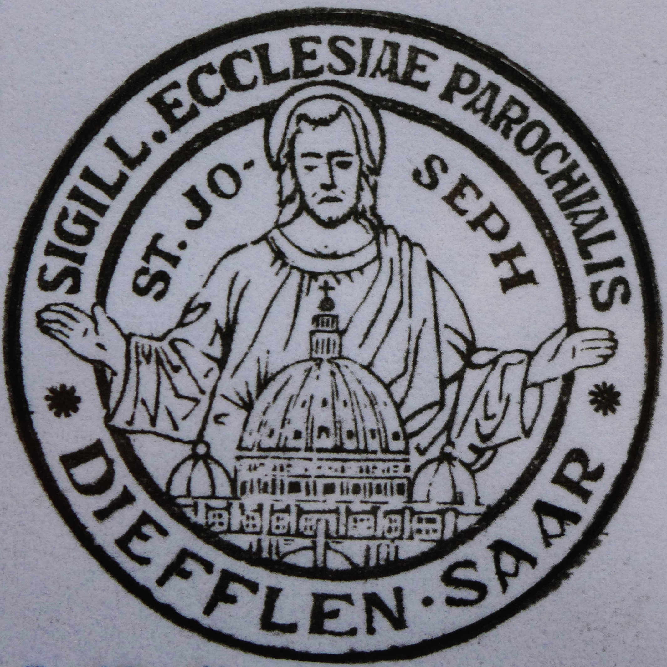 St. Josef und St. Wendelin (Diefflen), Erstes Siegel der Pfarrei mit dem heiligen Josef als Schutzpatron der katholischen Kirche